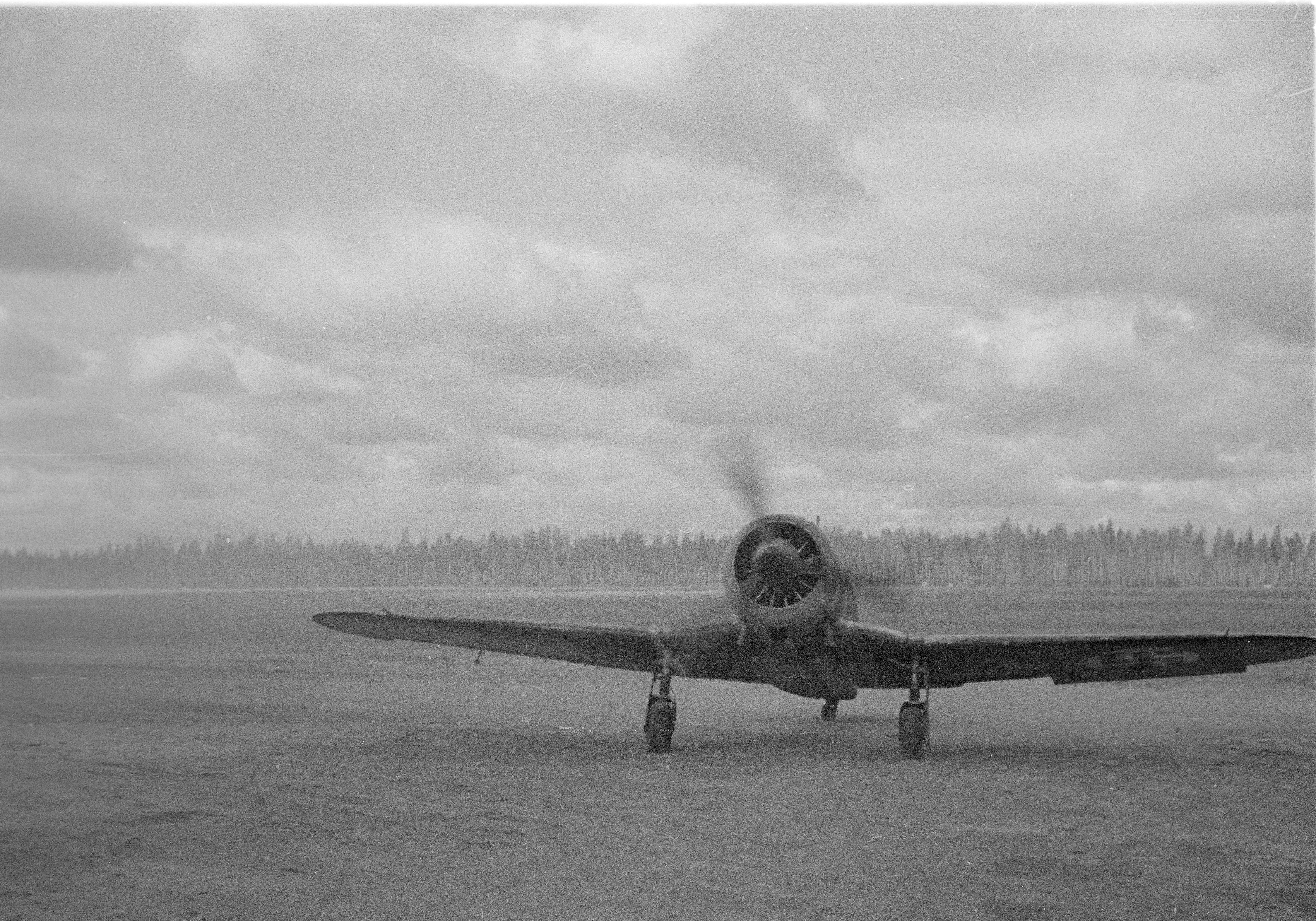 Lento on suoritettu ja nyt palataan kentälle. (Kuvassa on Fiat G.50 -hävittäjä) Kuvauspaikka: Raudun lentokenttä